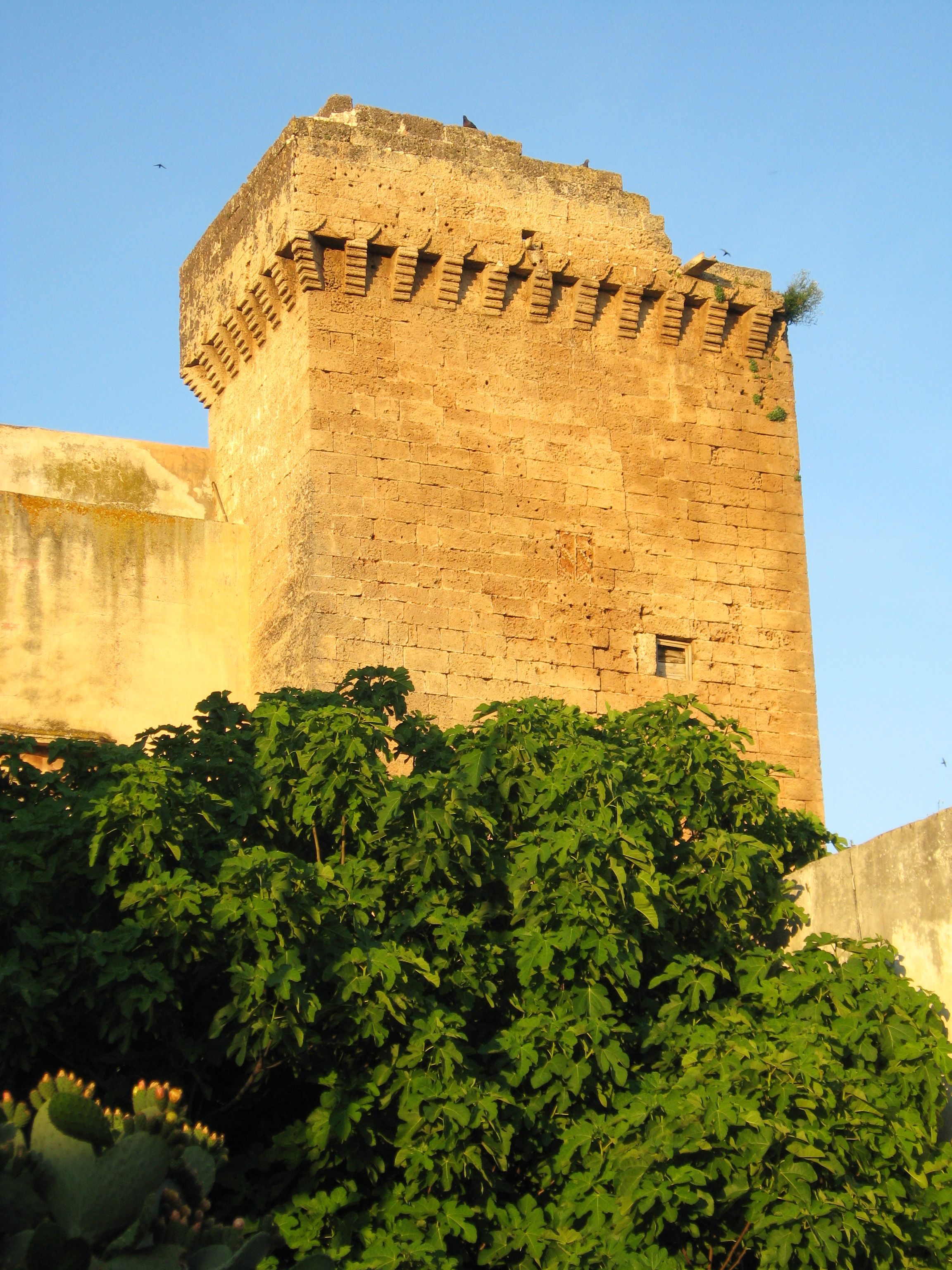 Torre del castello di Racale, un tempo inglobata nelle mura.